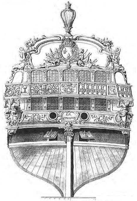 Dessin réalisé en 1766 par l'illustrateur suédois Carl August Ehrensvard lors d'une visite à Brest. Détail du vaisseau la Couronne, lancé en 1749 à 74 canons et refondu en 1766 pour en faire un vaisseau de 80 canons.